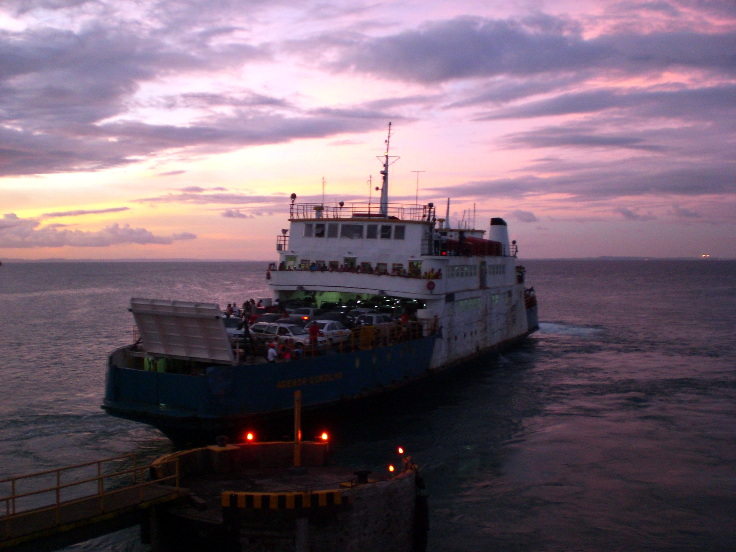 Rumo ao Salvador